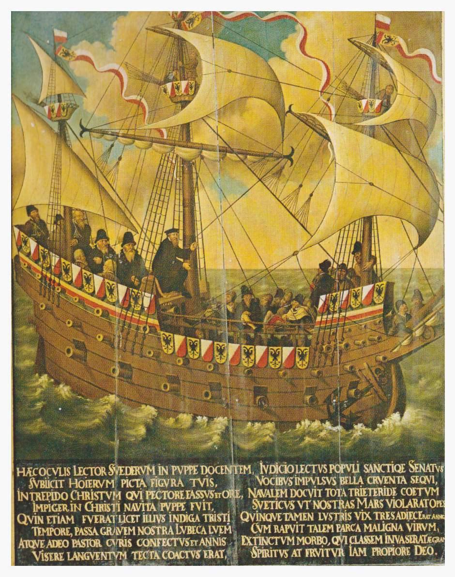 Denkgemälde für Sweder Hoyer. Prediger an St. Jakobi und auf der Lübecker Flotte im Dreikronenkrieg gegen Schweden 1565. Er erlag am 4. Oktober 1565 im Alter von 28 Jahren einer Seuche. Ausschnitt des Tafelbildes in der Lübecker Jakobikirche. Literatur: Bau- und Kunstdenkmäler der Freien und Hansestadt Lübeck, Band III. S. 407/408